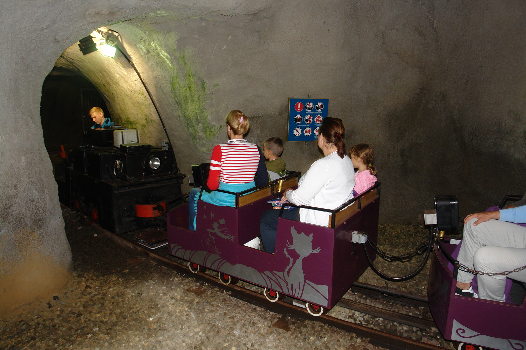 Grazer Märchenbahn